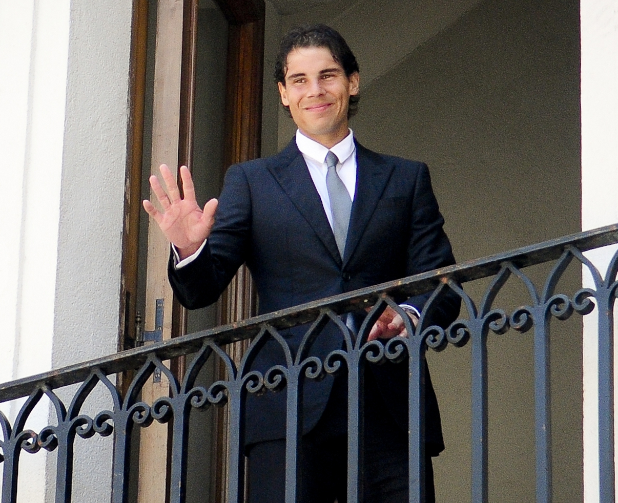 Rafael Nadal au palais présidentiel chilien de La Moneda en février 2013.